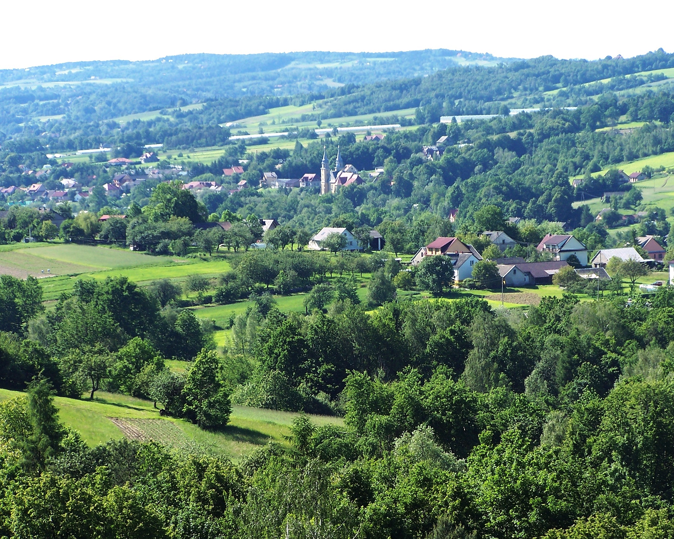 Ogólny widok centrum Trzciany (z Kierlikówki)